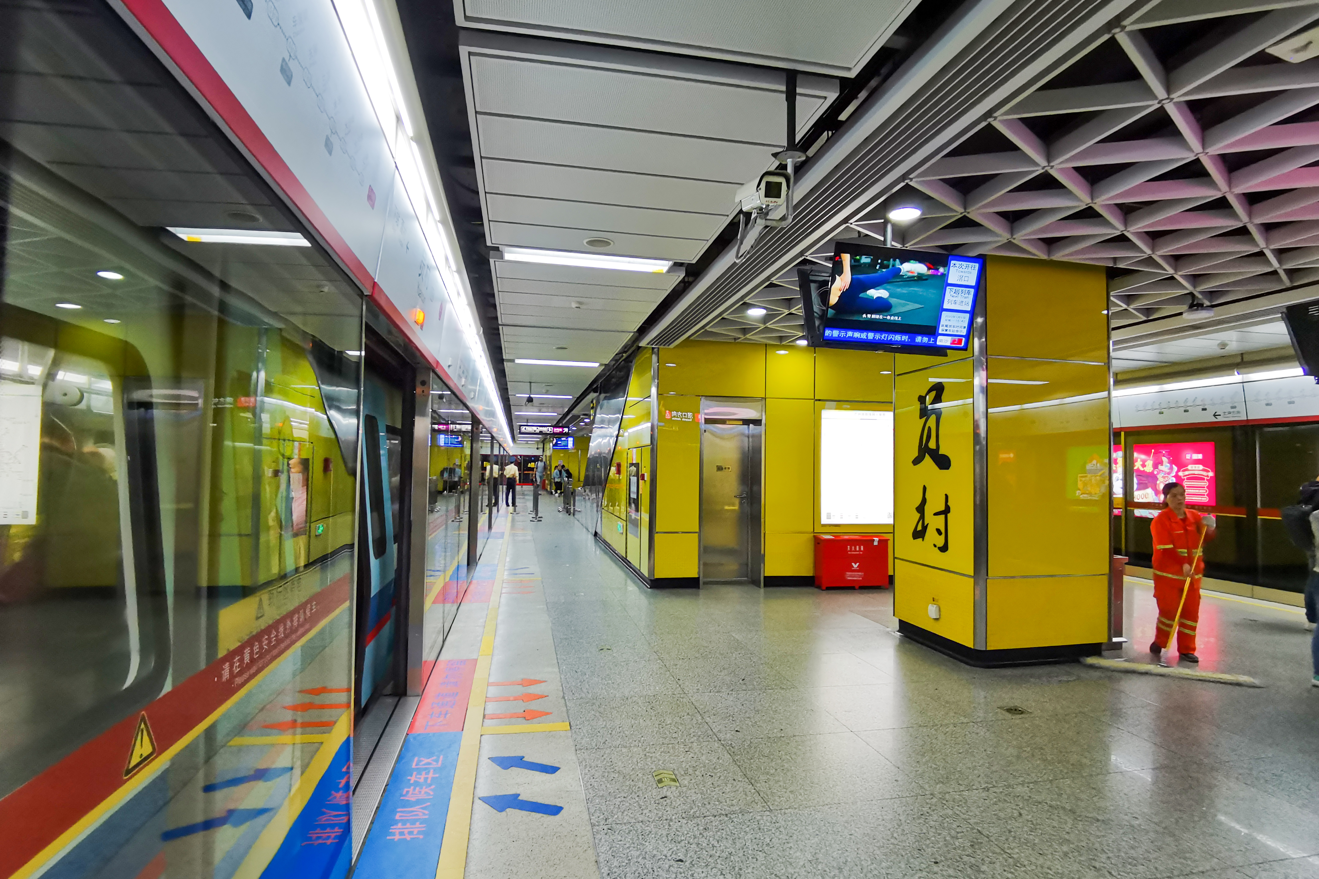 广州地铁员村站